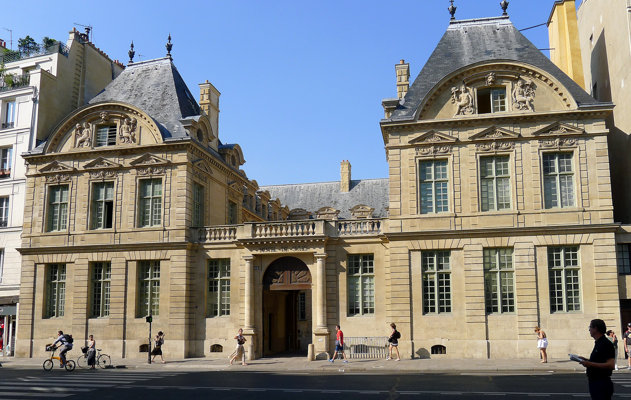 Hôtel de Sully (62 rue Saint-Antoine) - Paris IV